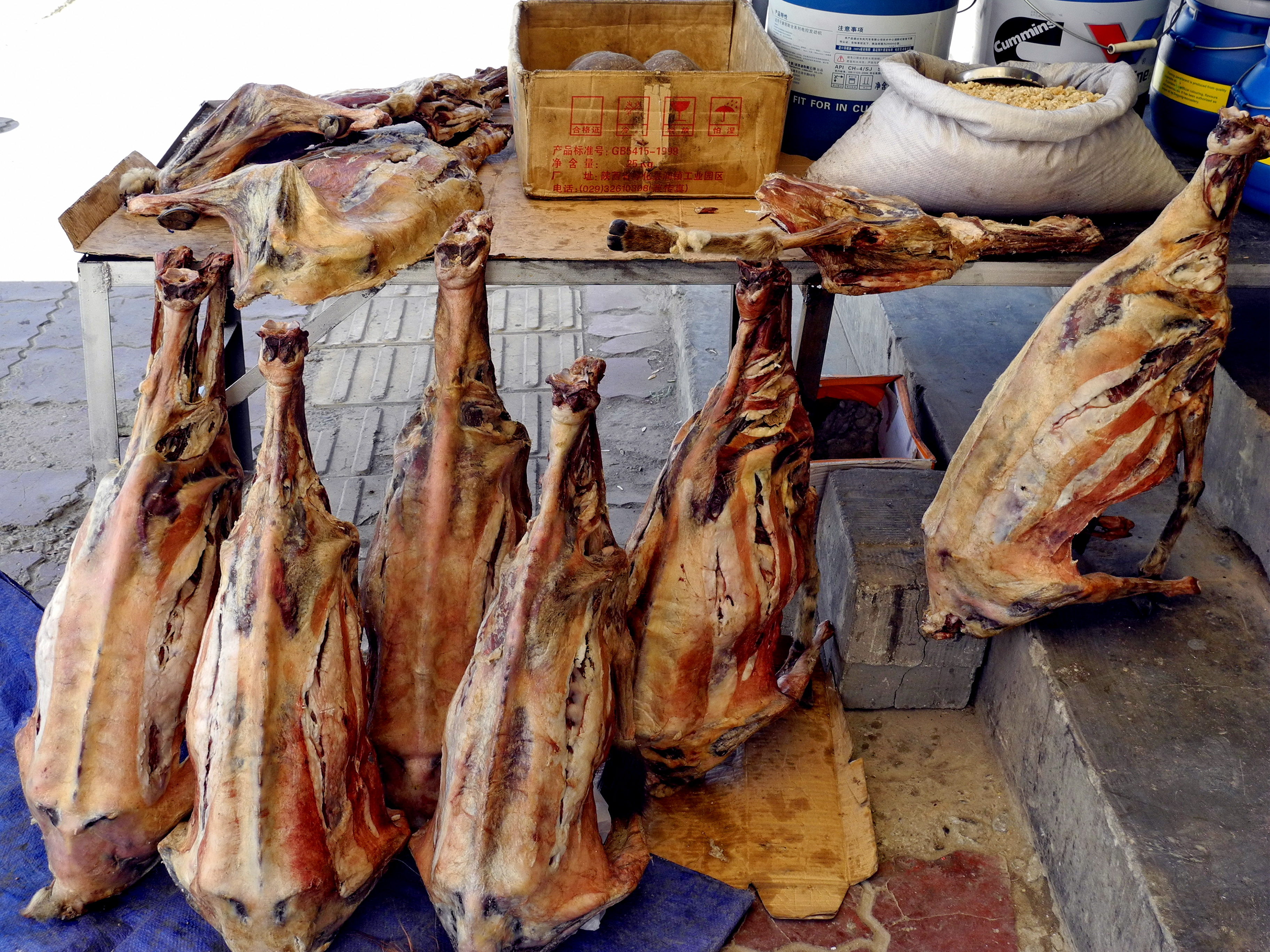 moutons séchés tibétains